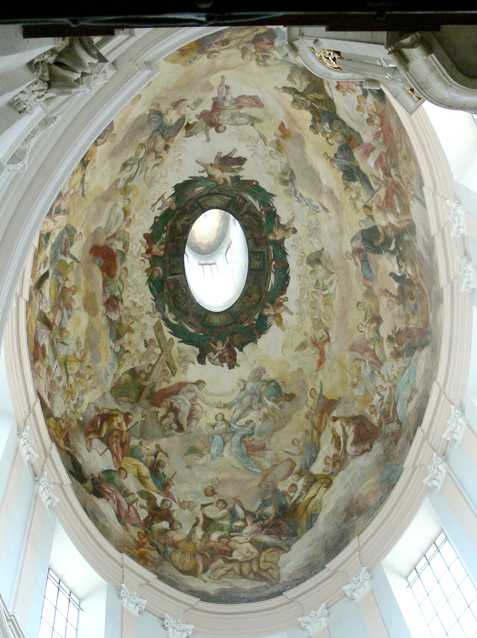 Salzburg, Dreifaltigkeitskirche am Makartplatz Kuppel mit Gemälde von Johann Michael Rottmayr (1697–1700): Krönung Mariens durch die Heilige Dreifaltigkeit ' Johann Michael Rottmayr (1656–1730) DescriptionAustrian painterDate of birth/death 11 December 1656 25 October 1730 Location of birth/death Laufen an der Salzach (Oberbayern) ViennaWork location Salzburg, WienAuthority control : Q674772 VIAF: 13099983 ISNI: 0000 0000 6629 4671 ULAN: 500017193 LCCN: n81028916 WGA: ROTTMAYR, Johann Michael WorldCat creator QS:P170,Q674772